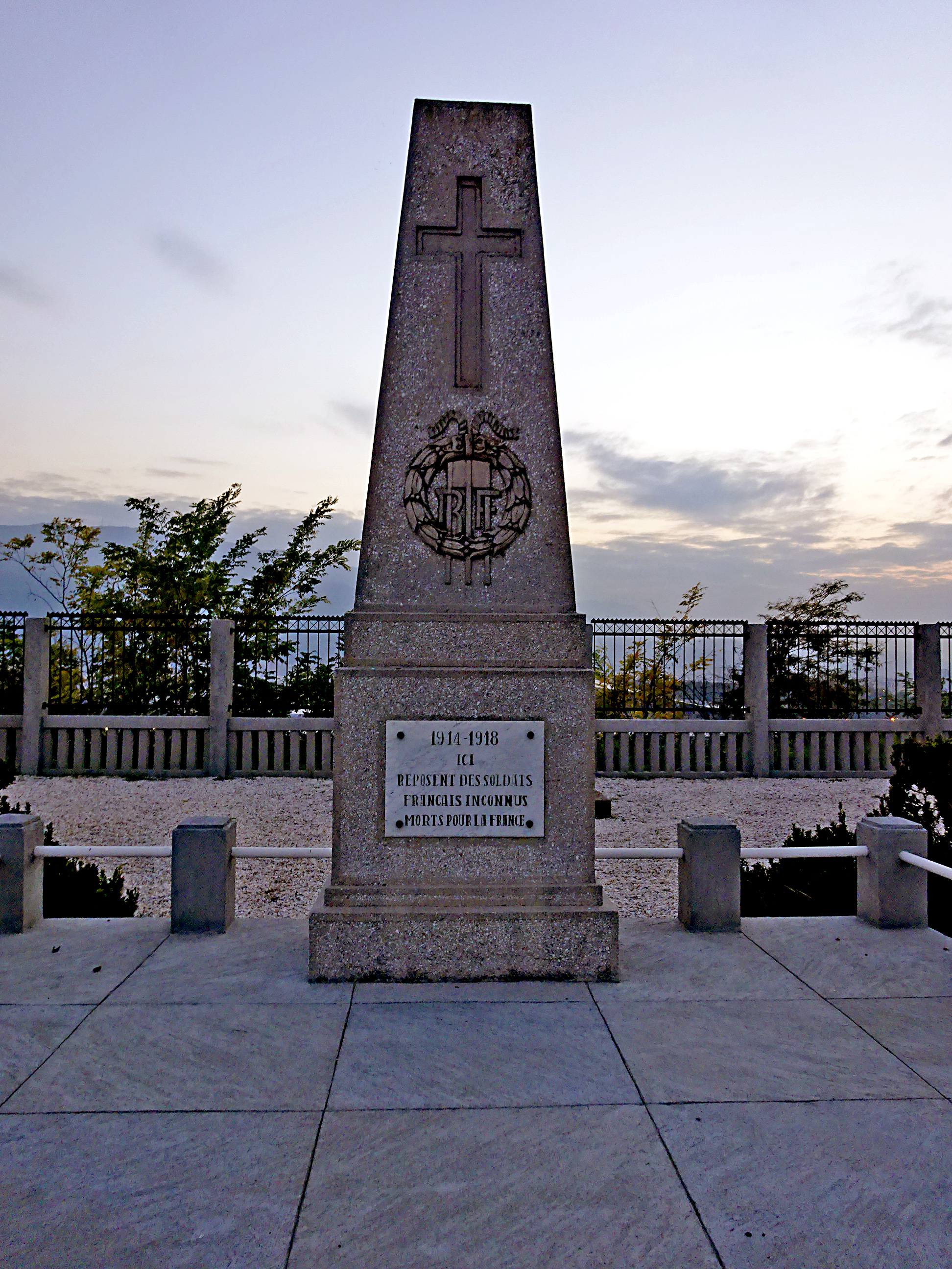 Француски гробишта во Скопје Ова е фотографија на споменик на културата во Македонија со типски код: D01This is a a photo of a cultural monument in North Macedonia with type id: D01